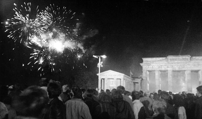 ADN-Thomas Uhlemann-3.10.90 Berlin: Vereinigung Kurz nach Mitternacht wurden von drei Orten - hier am Brandenburger Tor - Feuerwerkskörper gestartet. Damit erreichte die Begeisterung von Hunderttausenden, die sich im Zentrum von Berlin versammelt hatten, um die Vereinigungsfeierlichkeiten live zu erleben, einen neuen Höhepunkt.